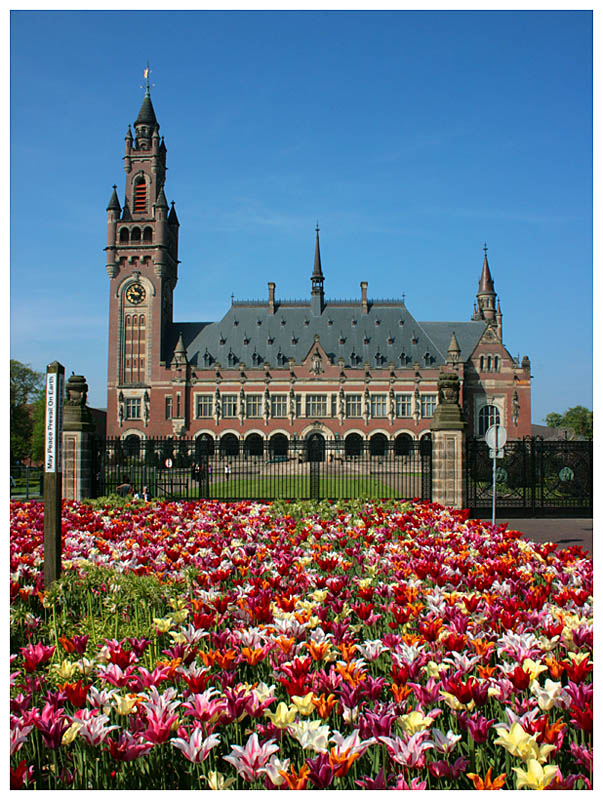 Palais de la Paix